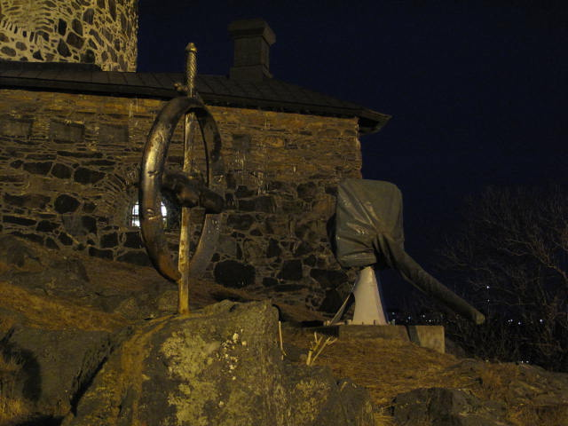 Svärd i sten och salutkanon vid Skansen Lejonet i Göteborg.